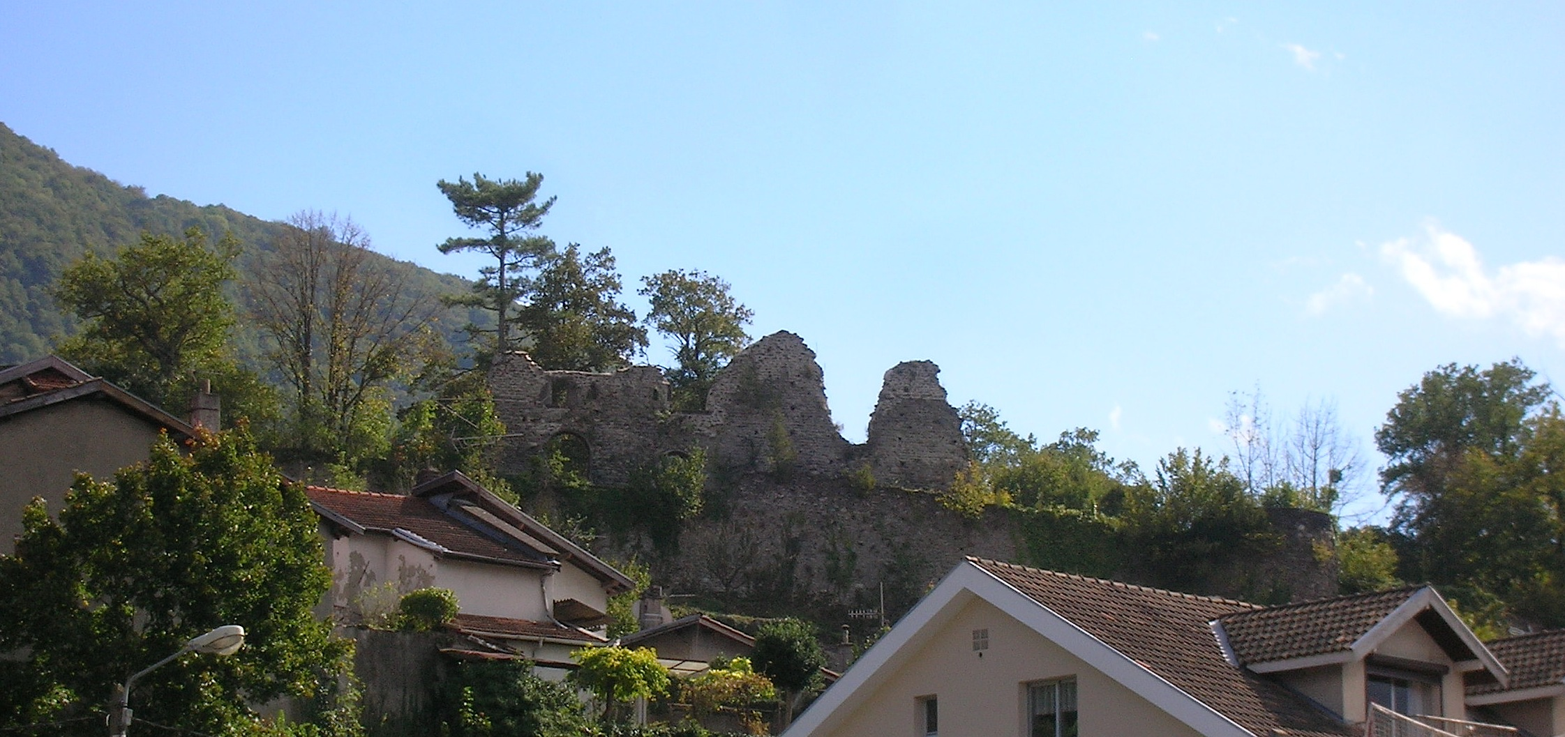 Chateau du Roi, Vizille, Isère, Rhone-Alpes.